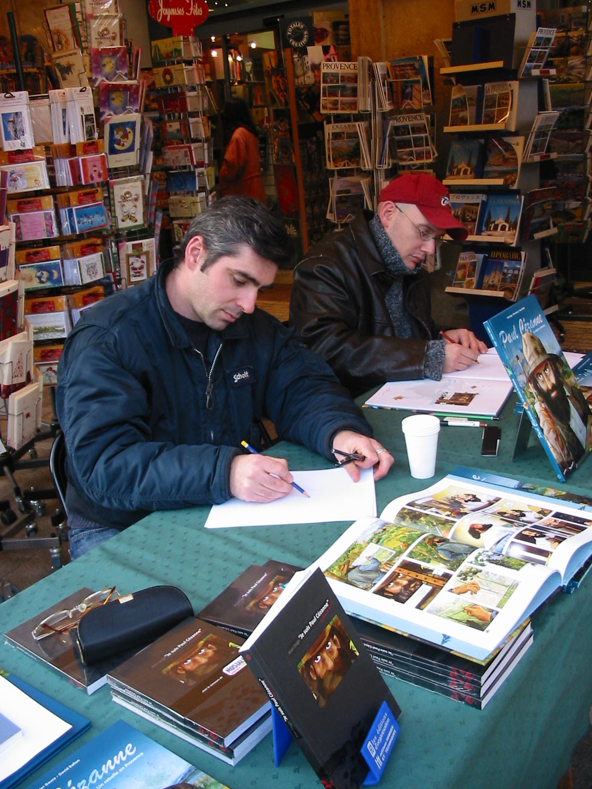 Olivier Bauza (gauche), David Ballon (droite), dédicaçant un album de bande dessinée à Aix-en-Provence